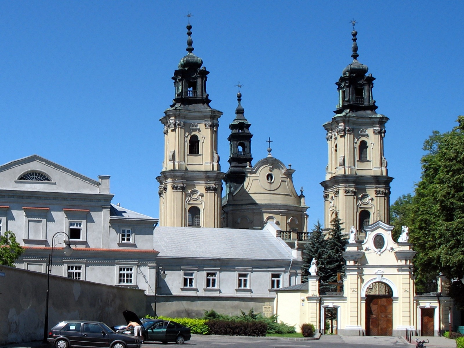 Jarosław (Poland), St. Mary's Basilica